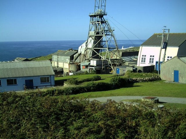 Kopalnie cyny w Kornwalii